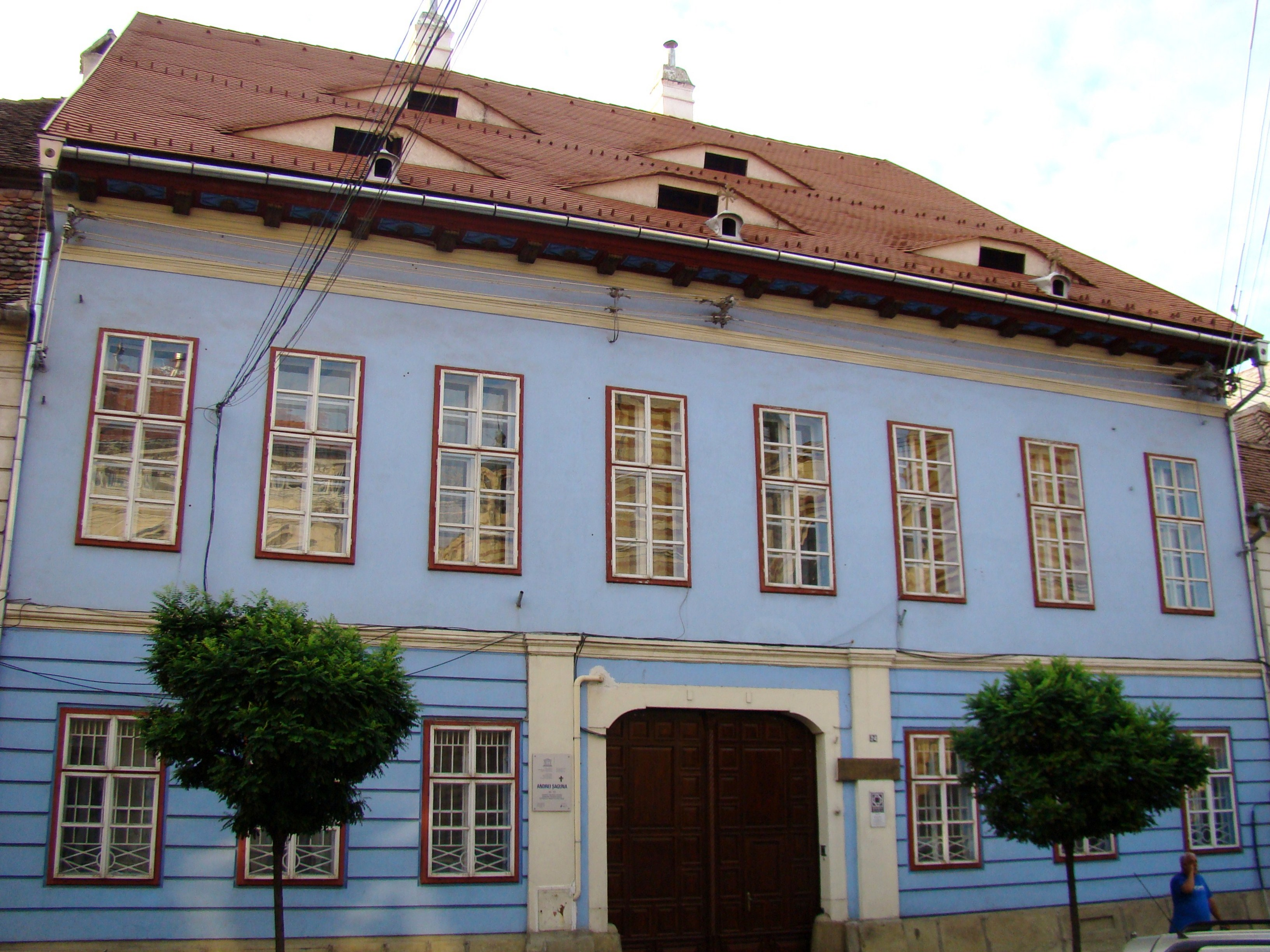 Ansamblul "Mitropolia Ortodoxă și Facultatea de Teologie Ortodoxă" 04